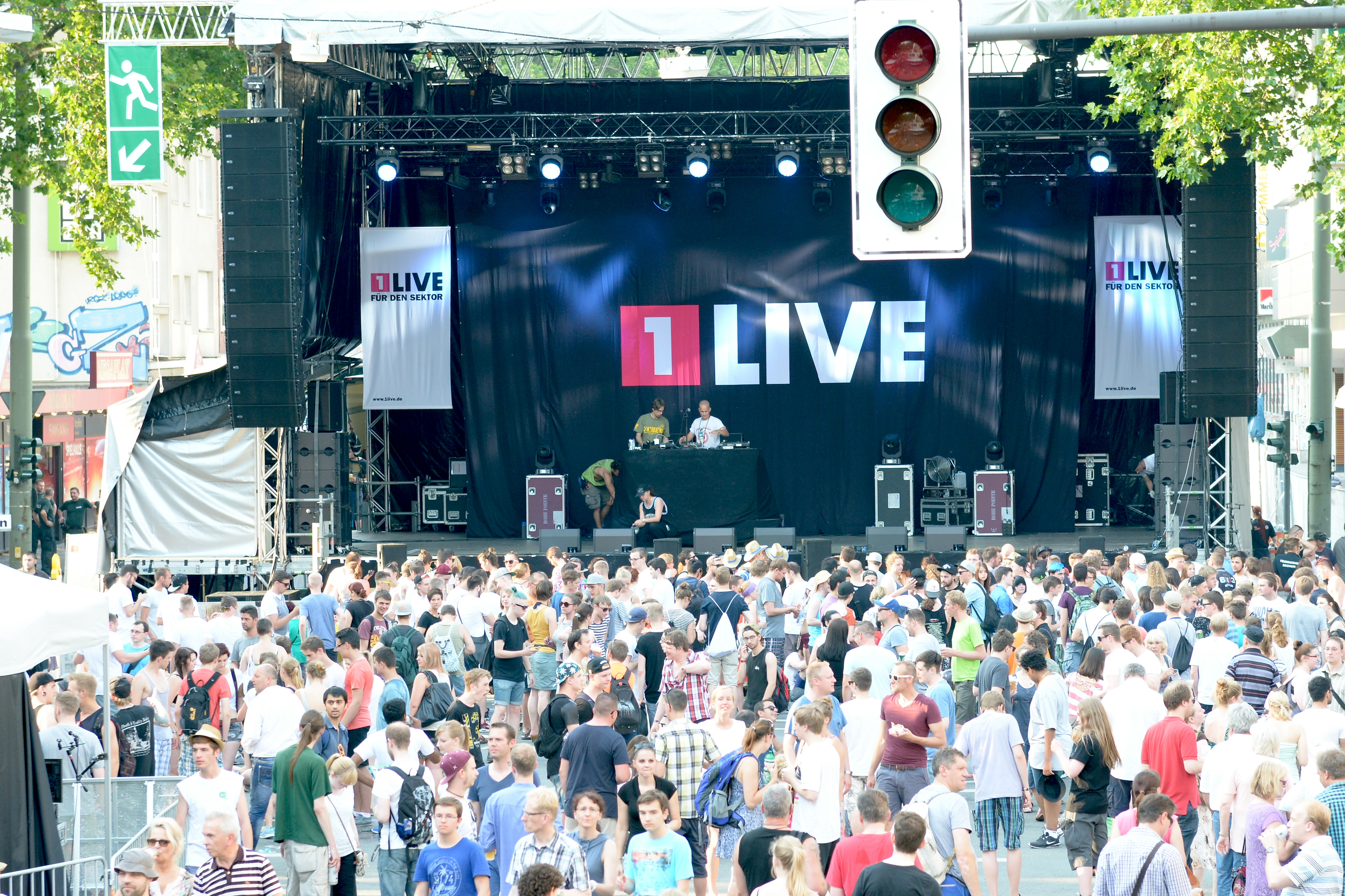 Bochum Total 2015